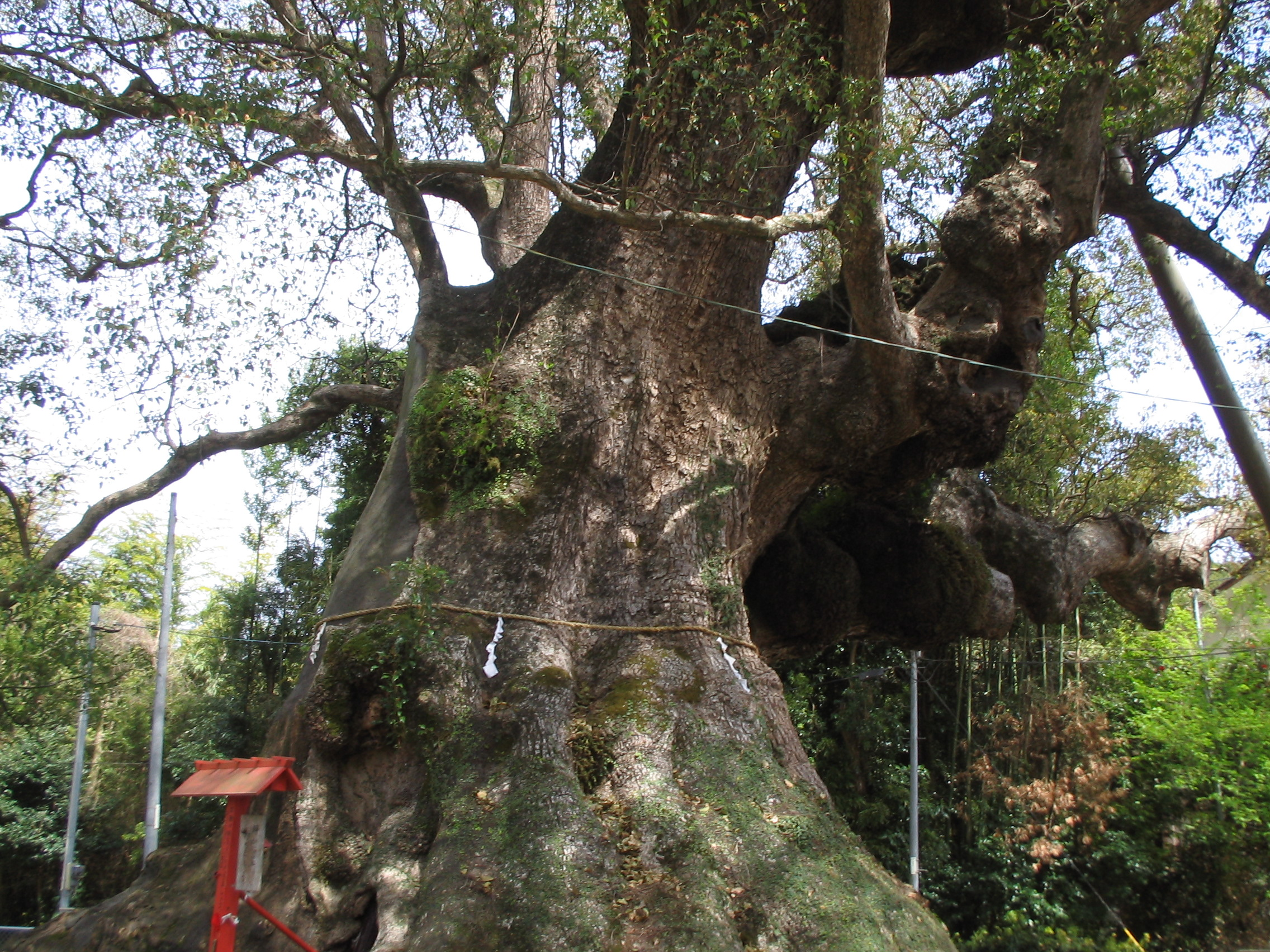 安楽山宮神社の志布志の大クス